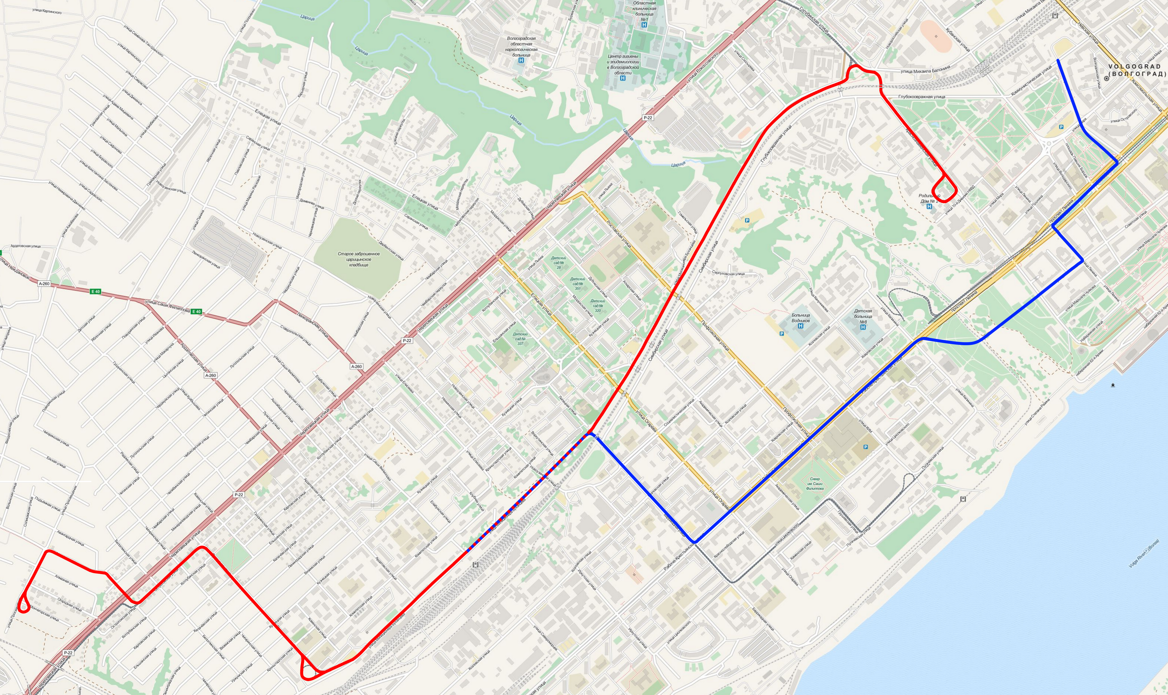 Маршрут трамвая №1 Царицына (отмечен синим) и Волгограда (отмечен красным) на карте OpenStreetMap